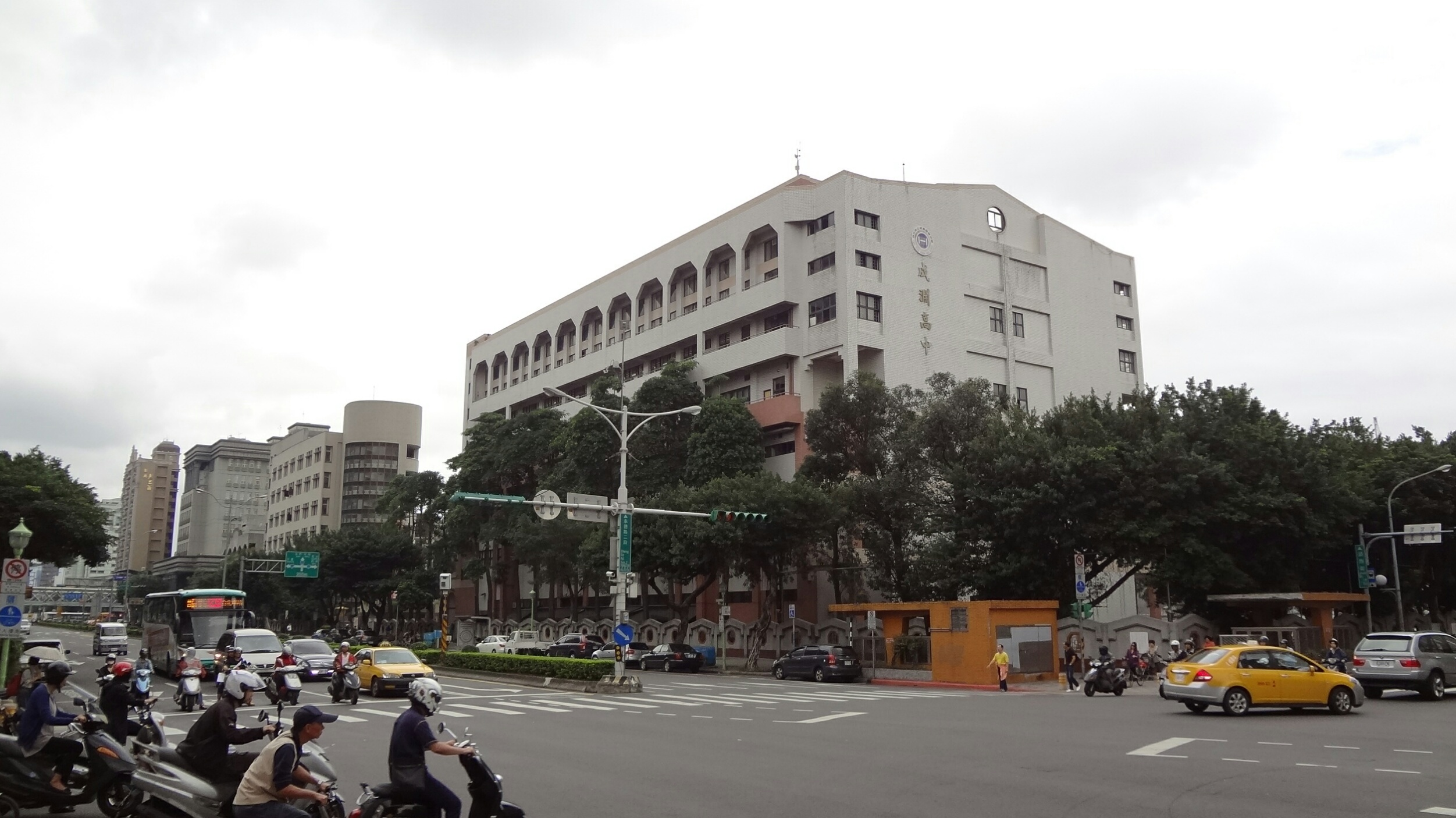 臺北市立成淵高級中學。